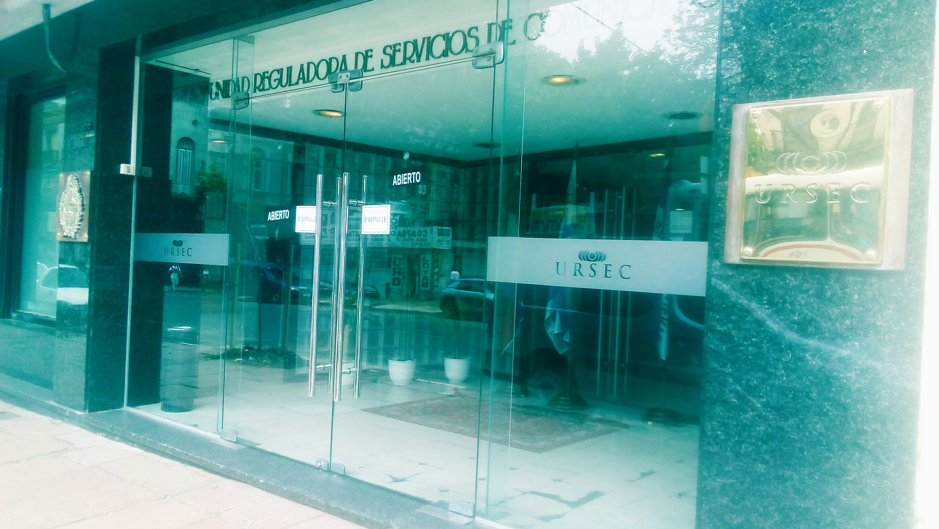 Sede del organismo público.